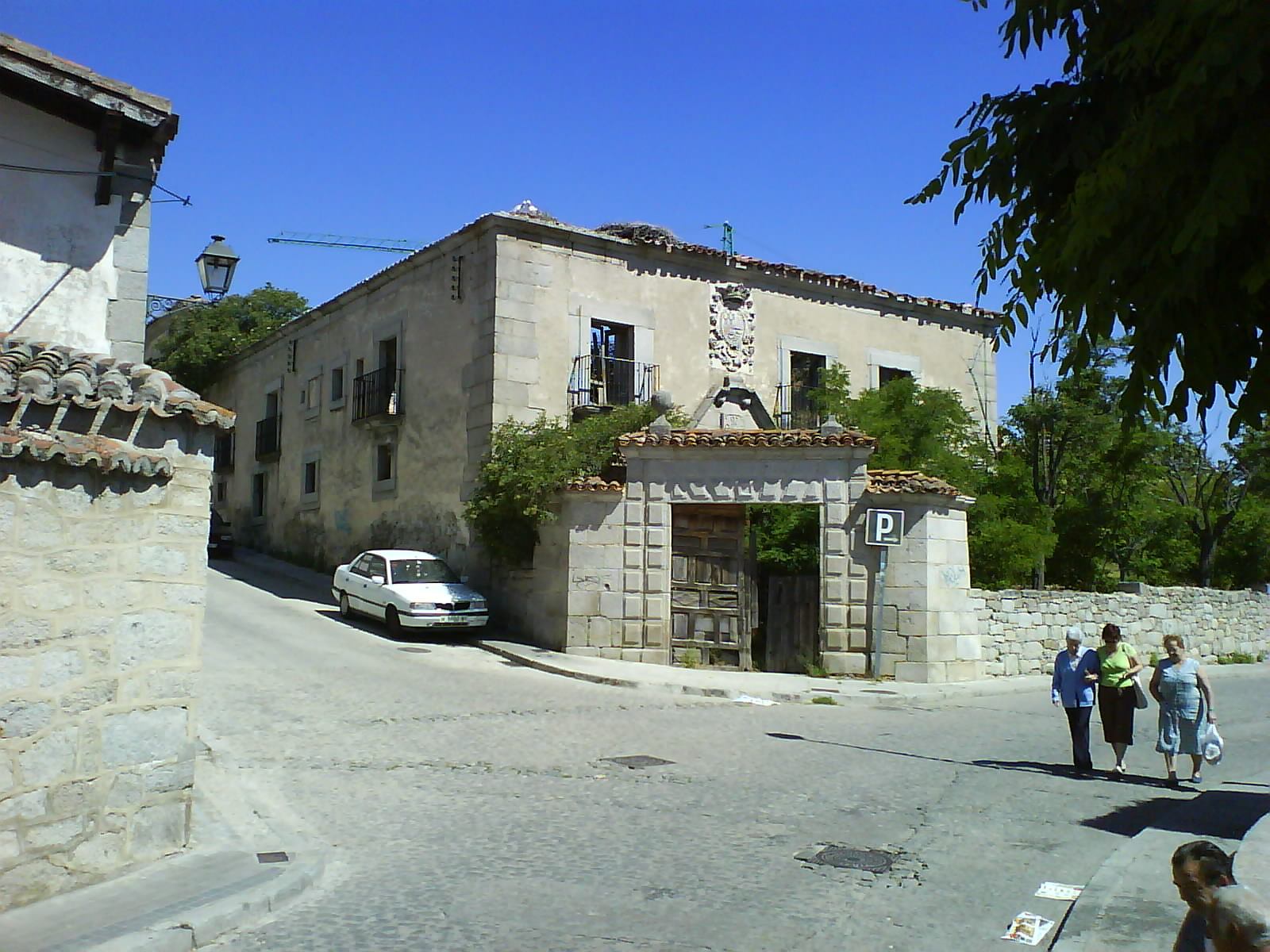 El Espinar, Segovia España. Palacio del Esquileo.